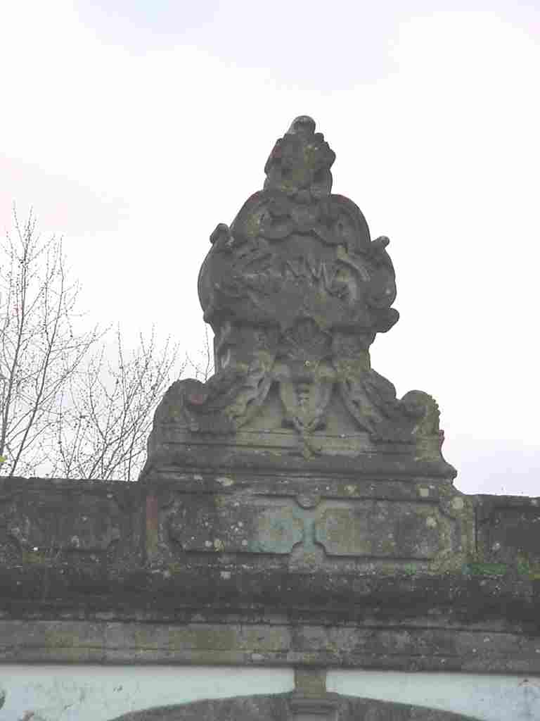 Sculpted rock over the entranceway to the Quinta da Boa Hora, Terra Chã, Angra do Heroísmo, Terceira (Azores), Portugal